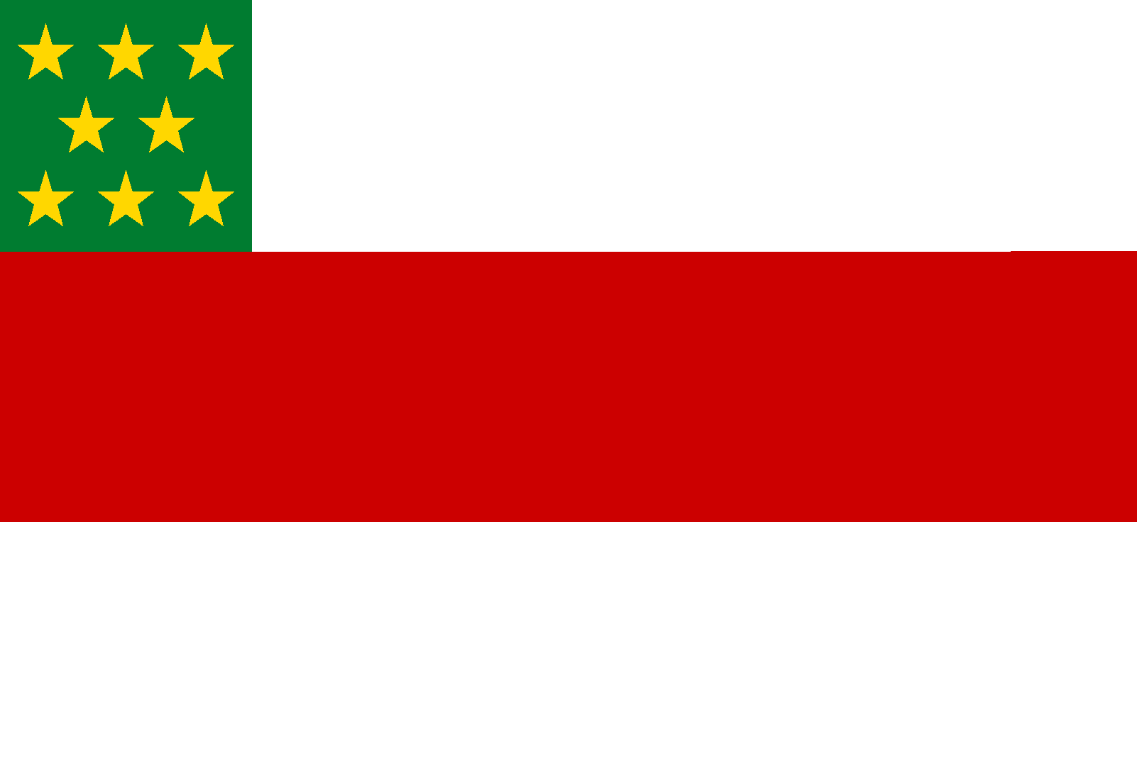 Dos franjas blancas y una roja que simbolizan a la pureza y al esfuerzo de su gente respectivamente. Un cuadro verde que representa a la fertilidad y dentro de ella 8 estrellas que simbolizan a las provincias conformantes (Talara, Paita, Sechura, Piura, Sullana, Morropón, Ayabaca, Huancabamba). Oficializado en 2003 Fuente